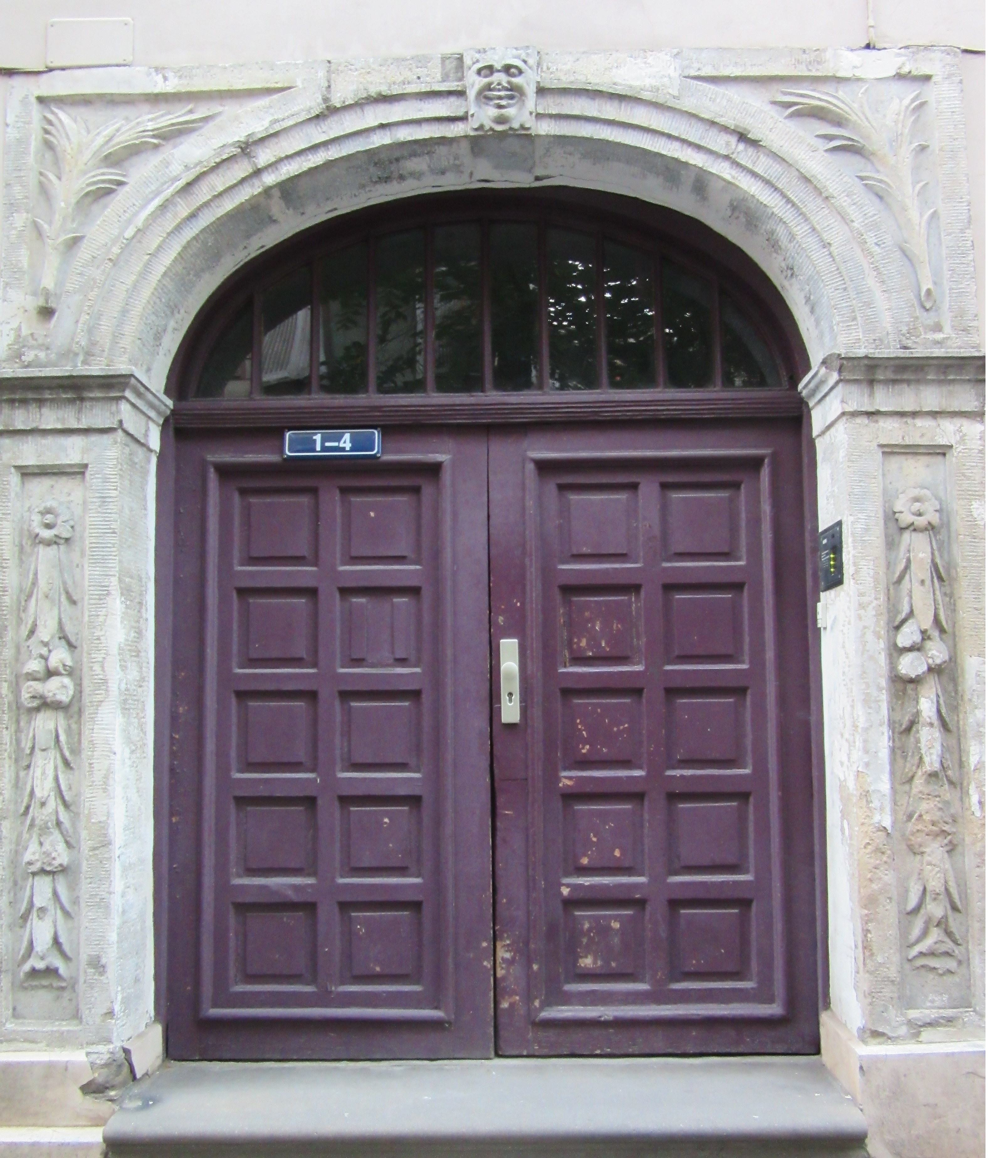 Portāls, Rīga, Bīskapa gāte 6